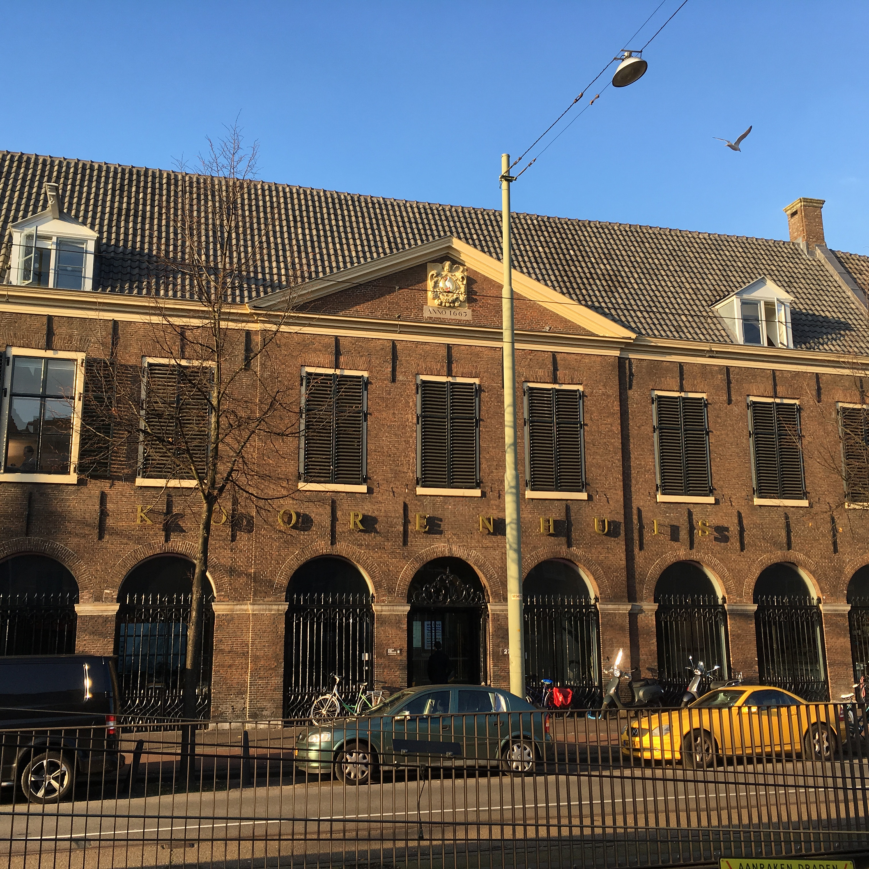 Het zeventiende-eeuwse Korenhuis aan de Prinsegracht in Den Haag